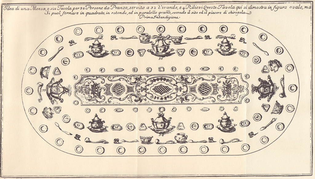 Inserto dell' antico libro il cuoco galante scritto da Vincenzo Corrado nel 1773